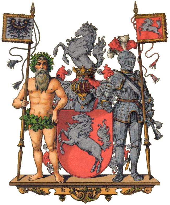 Vollwappen der preußischen Provinz Westfalen aus dem 19. Jahrhundert; Illustration von Professor Hugo Gerard Ströhl (1851-1919).